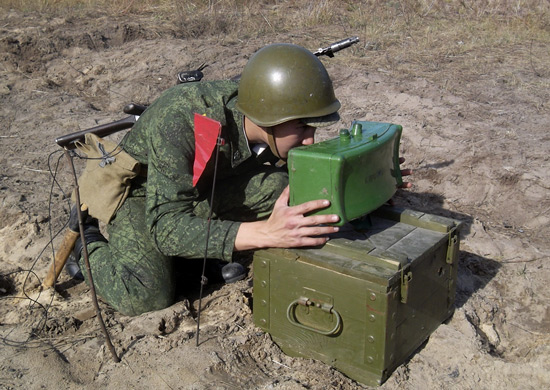 Тюменское высшее военно-инженерное командное училище. Практическое занятие по дисциплине «Инженерные заграждения». Установка мины МОН-90